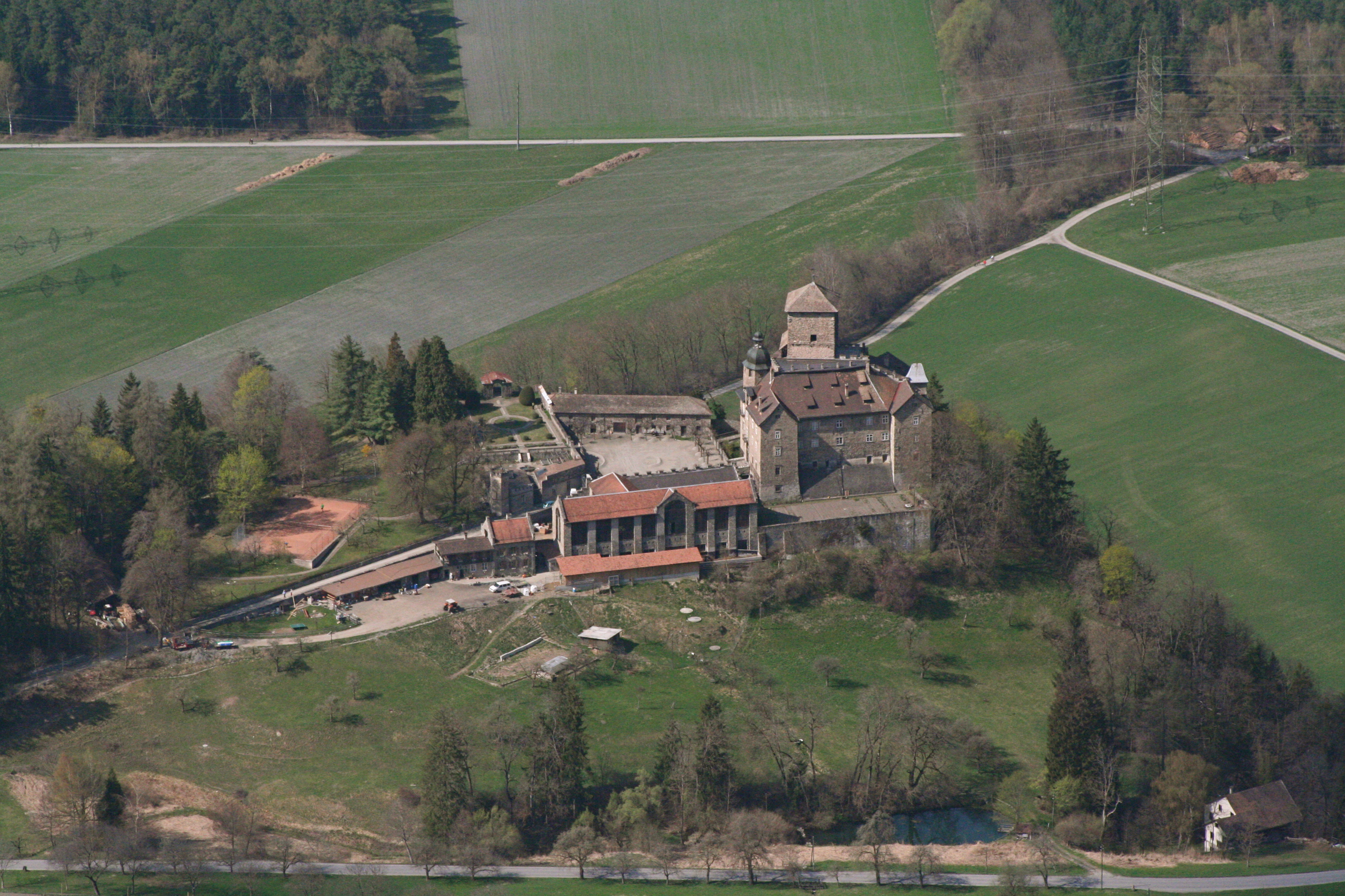 Schloss Ortenstein von Osten